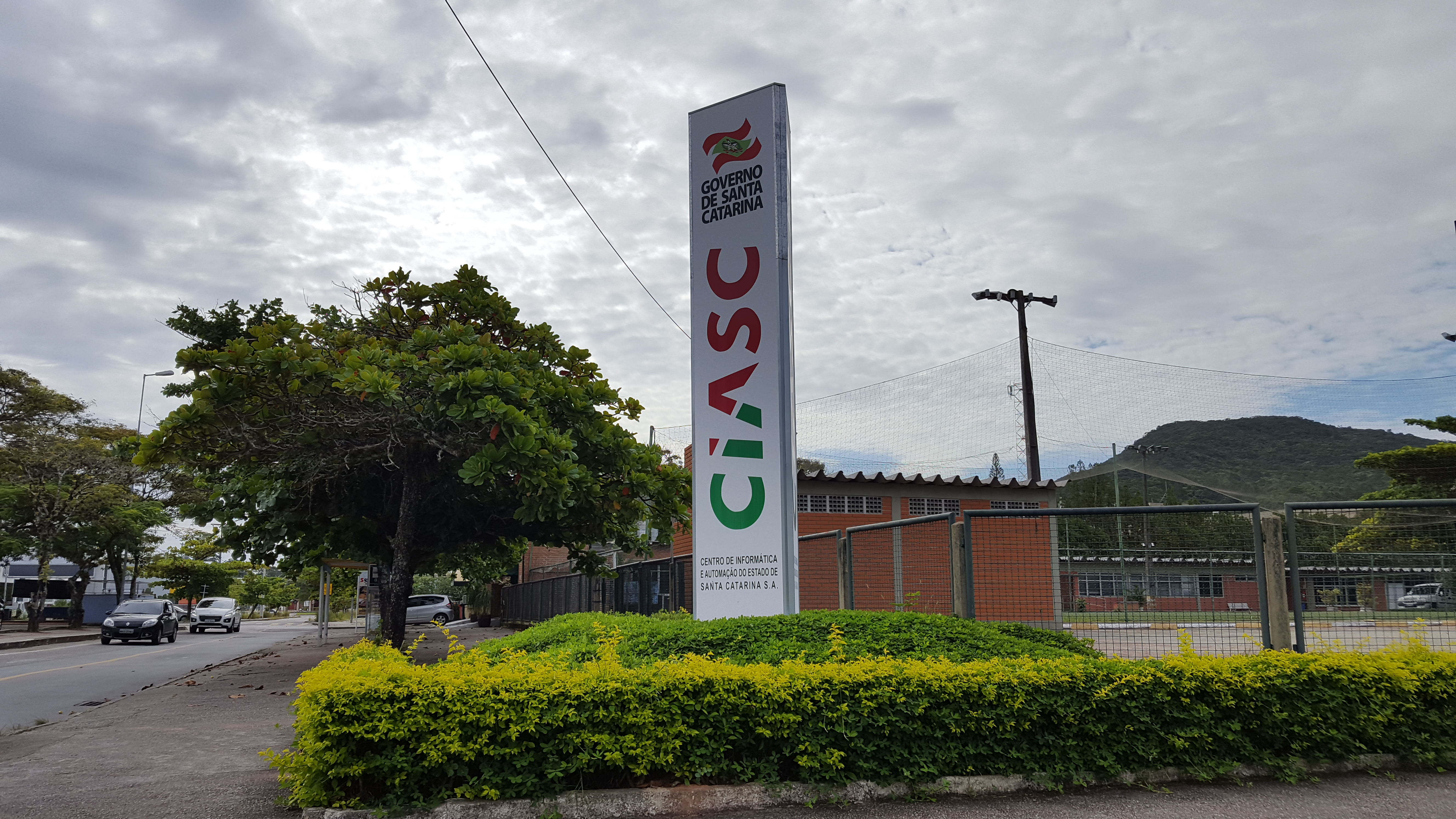 Entrada do CIASC em abril de 2017.